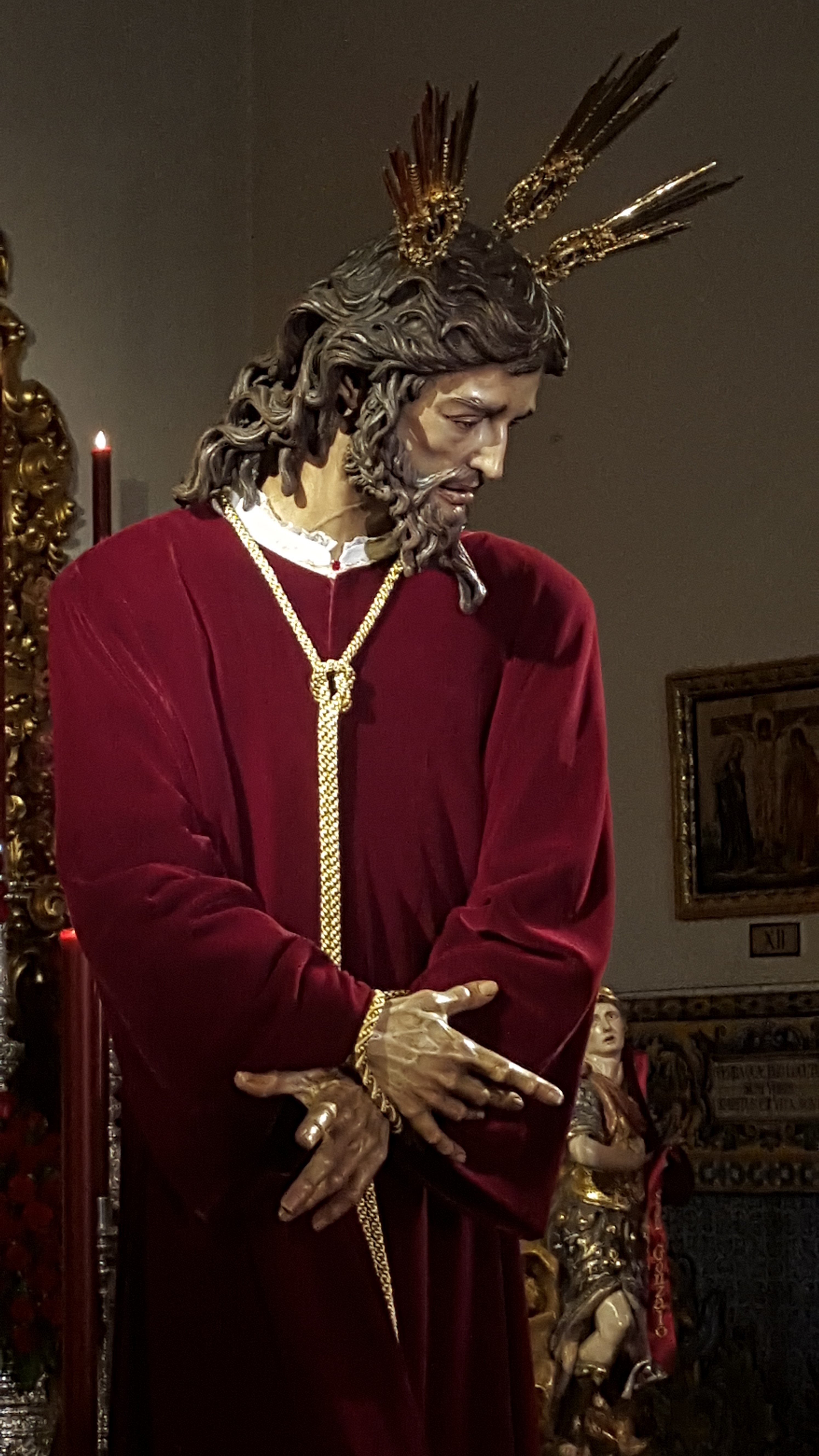 Imagen del Soberano Poder ante Caifás en besapié.